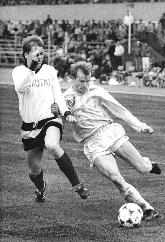 ADN-Thieme- 6.4.90 Karl-Marx-Stadt: Fußball-Oberliga FC Karl-Marx-Stadt - Stahl Eisenhüttenstadt 1:0 (0:0) Vor 5.000 Zuschauern setzt sich hier Mario Neuhäuser (r) gegen Olaf Backasch von Eisenhüttenstadt durch.